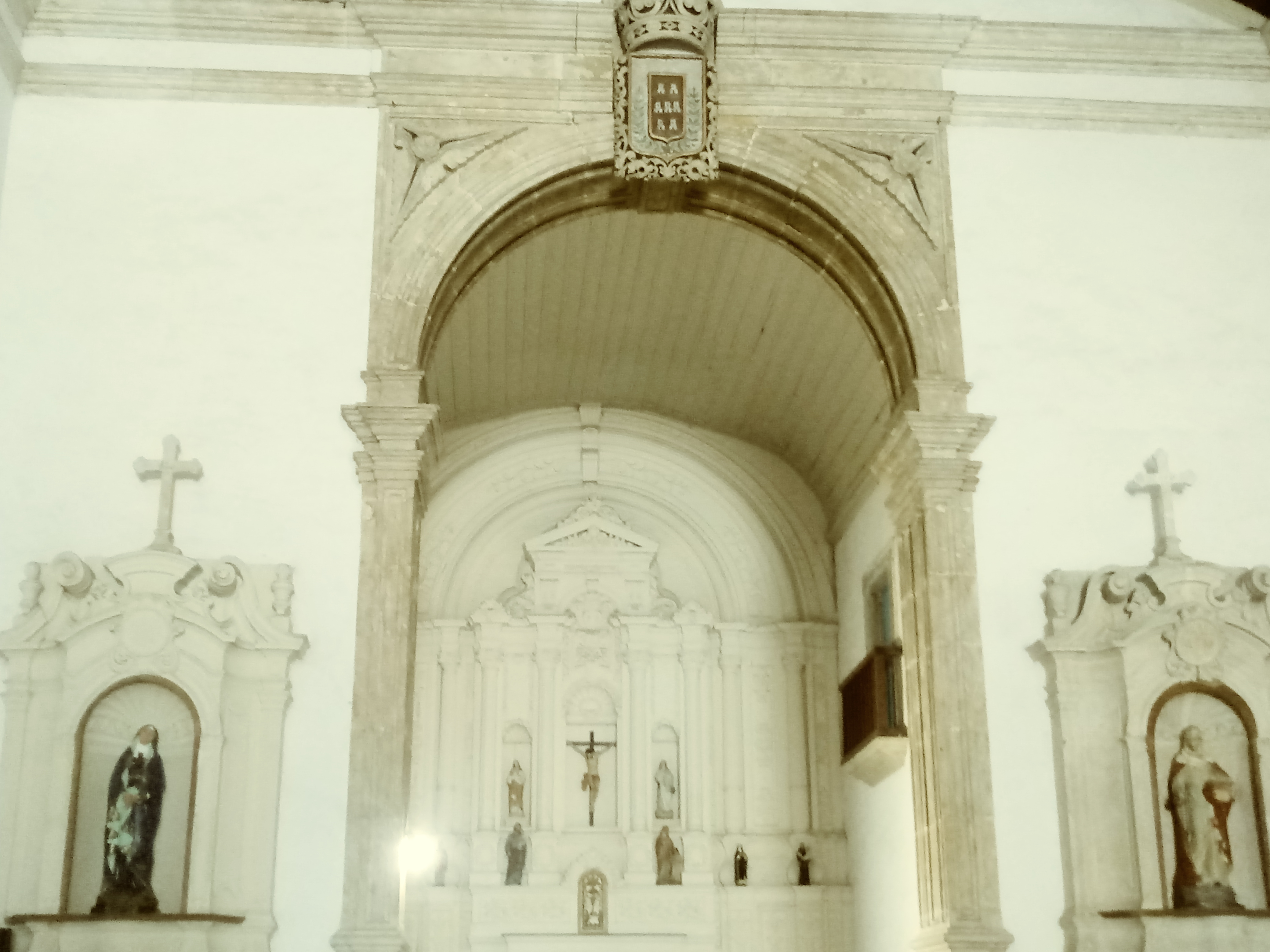 Altar mor da igreja da misericórdia joão pessoa pb